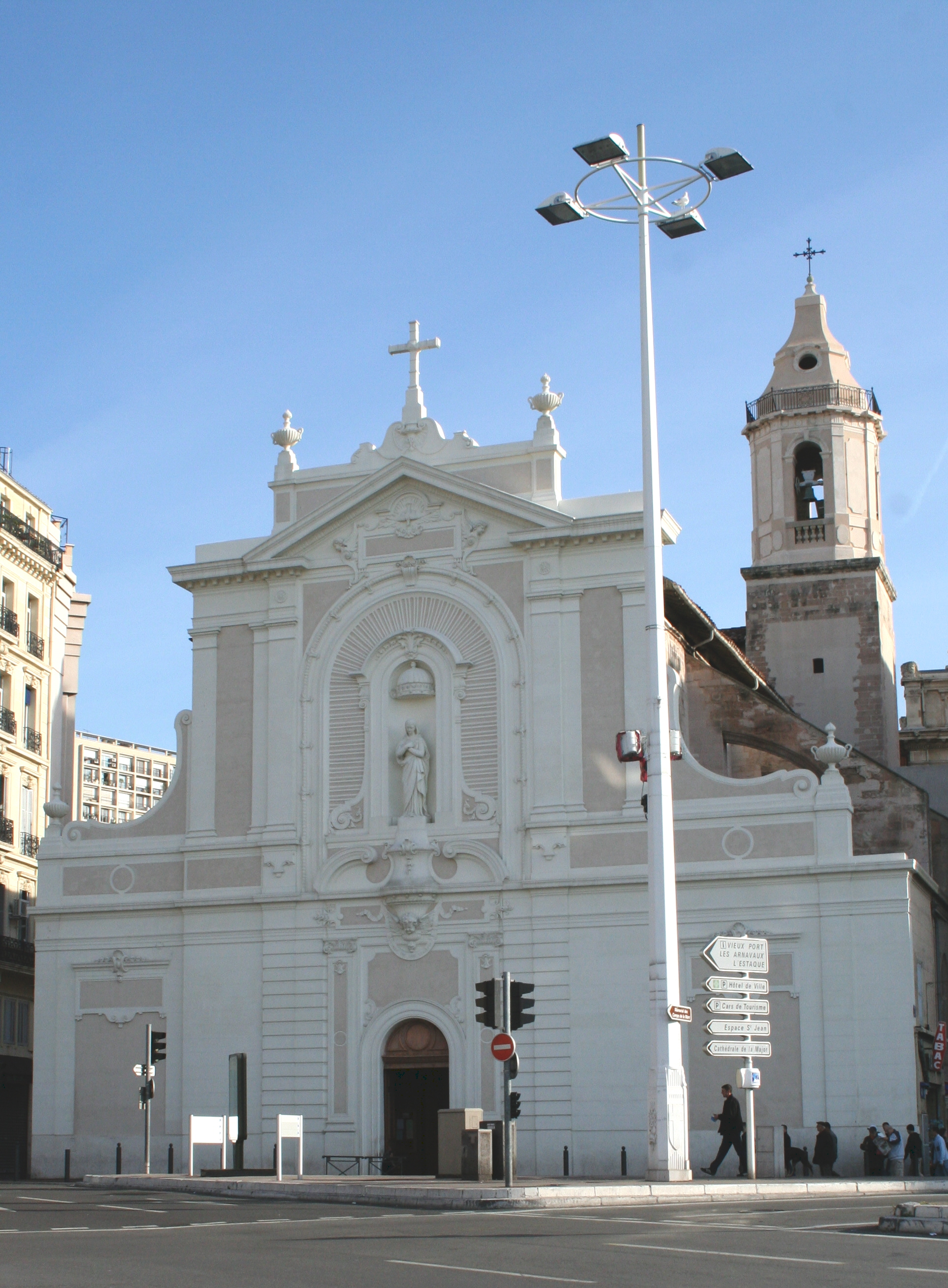 Église Saint-Ferréol les Augustins à Marseille, quai des Belges. Eglise du XVIe siècle remanié au XIXe siècle. Façade principale.